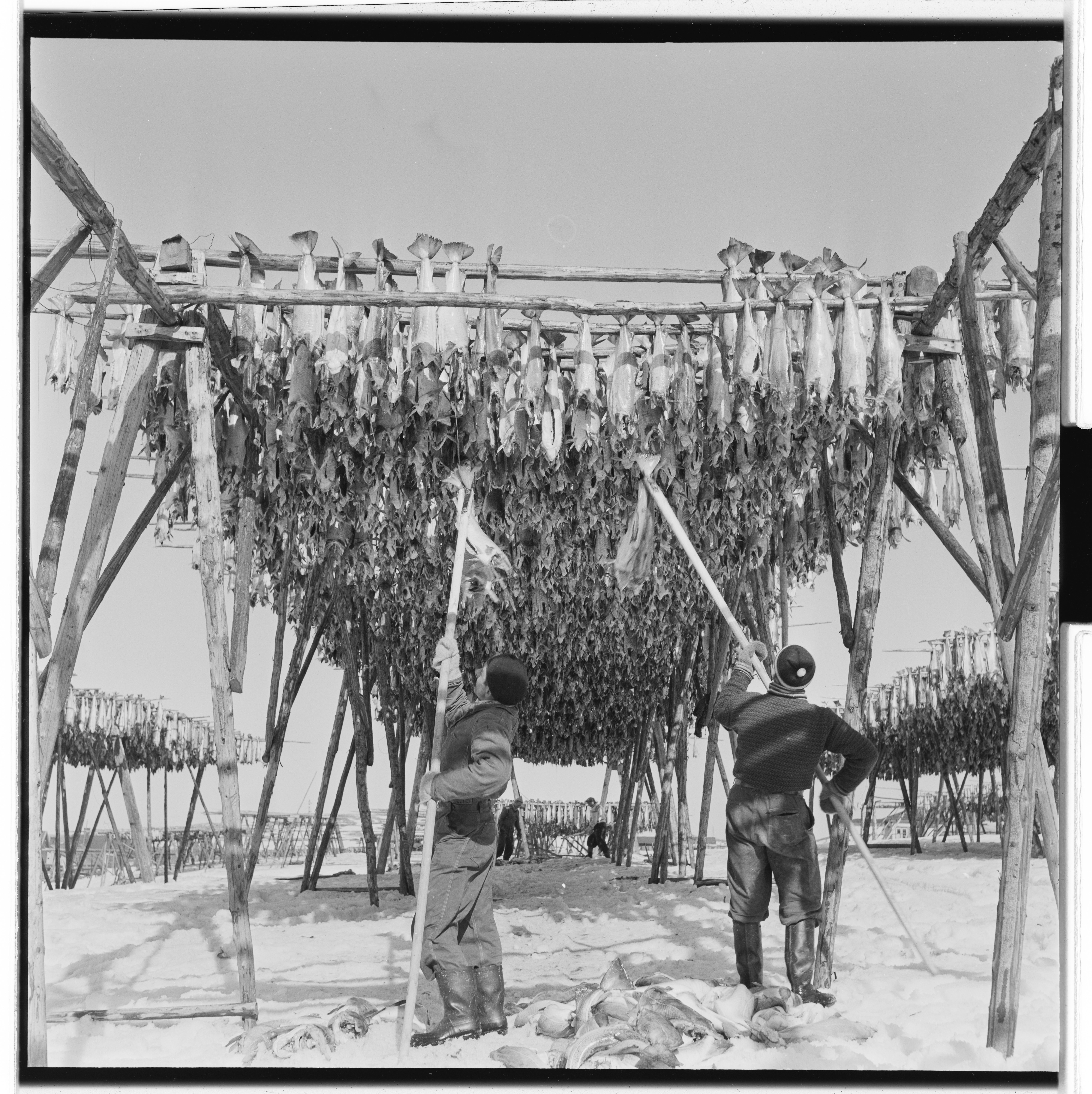 Bildet er hentet fra Arkivverket. Vårfiske på Vardø Arkivinstitusjon : Riksarkivet Arkivnavn : Billedbladet NÅ Sted : Norge, Finnmark, Vardø, Vardø Emneord: Industri, Arbeid, Fiskeindustri Avbildet